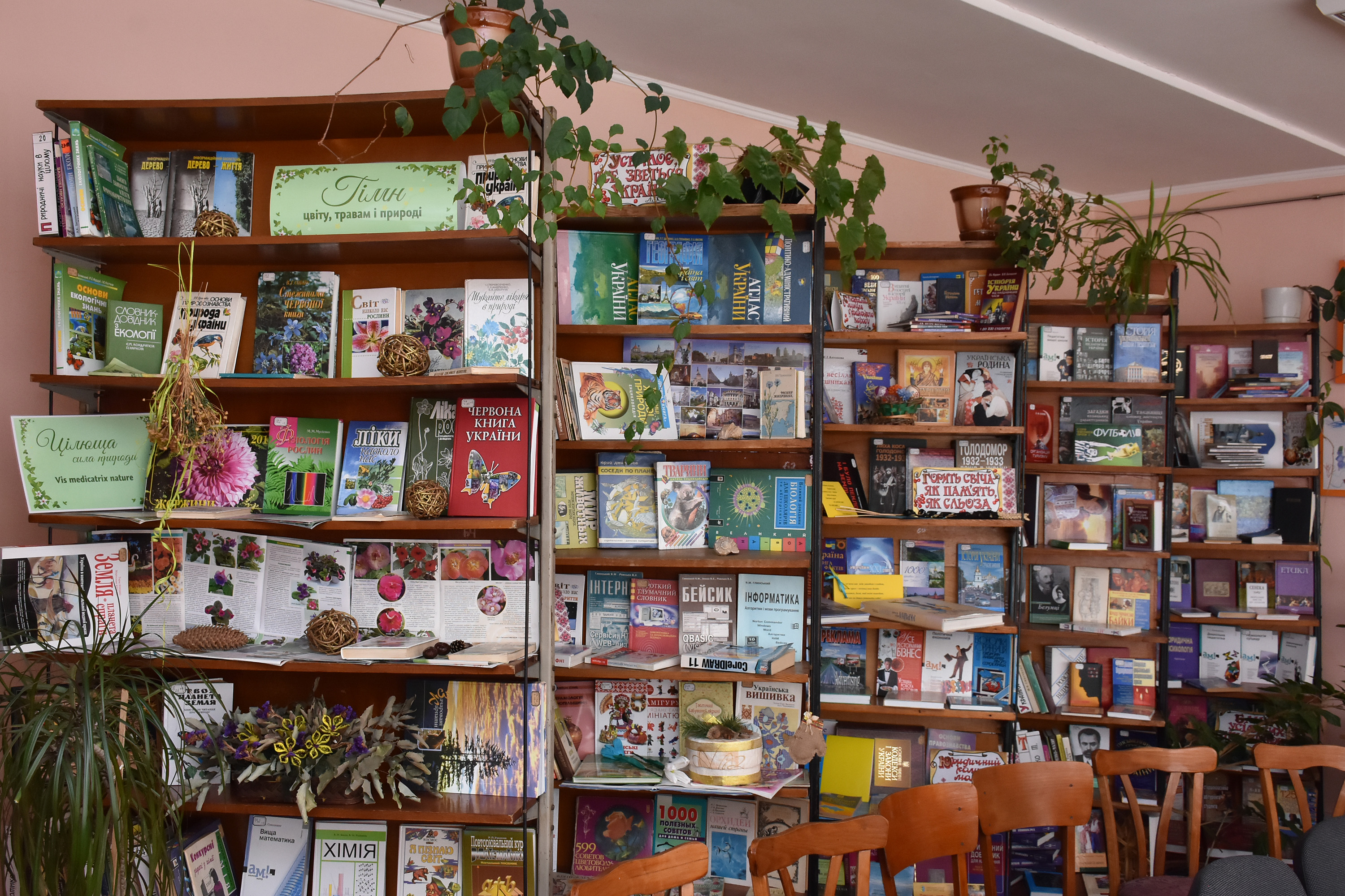 Бібліотека № 5 для дорослих Тернопільської міської централізованої бібліотечної системи.